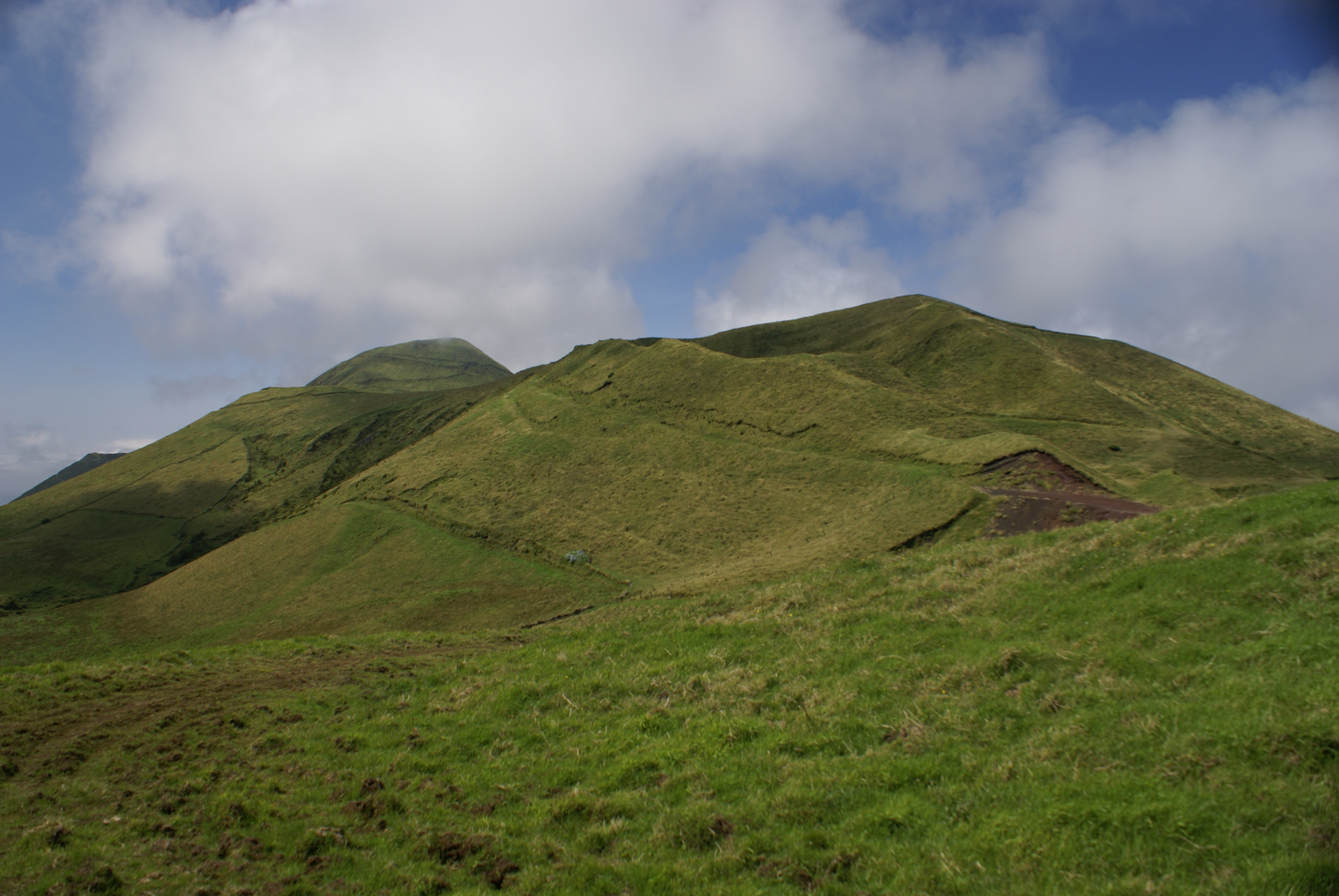 Pico Pinheiro, Norte Grande, Calheta, ilha de São Jorge, Açores